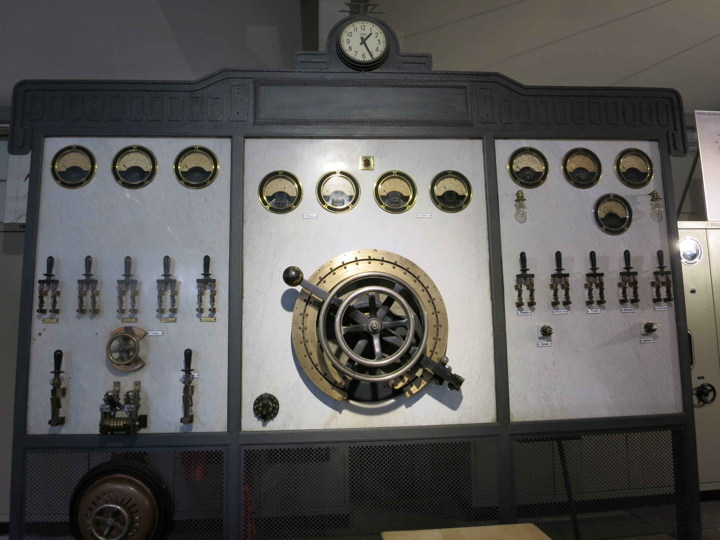 Historisches Kleinkraftwerk Ottenbach ZH, Schweiz